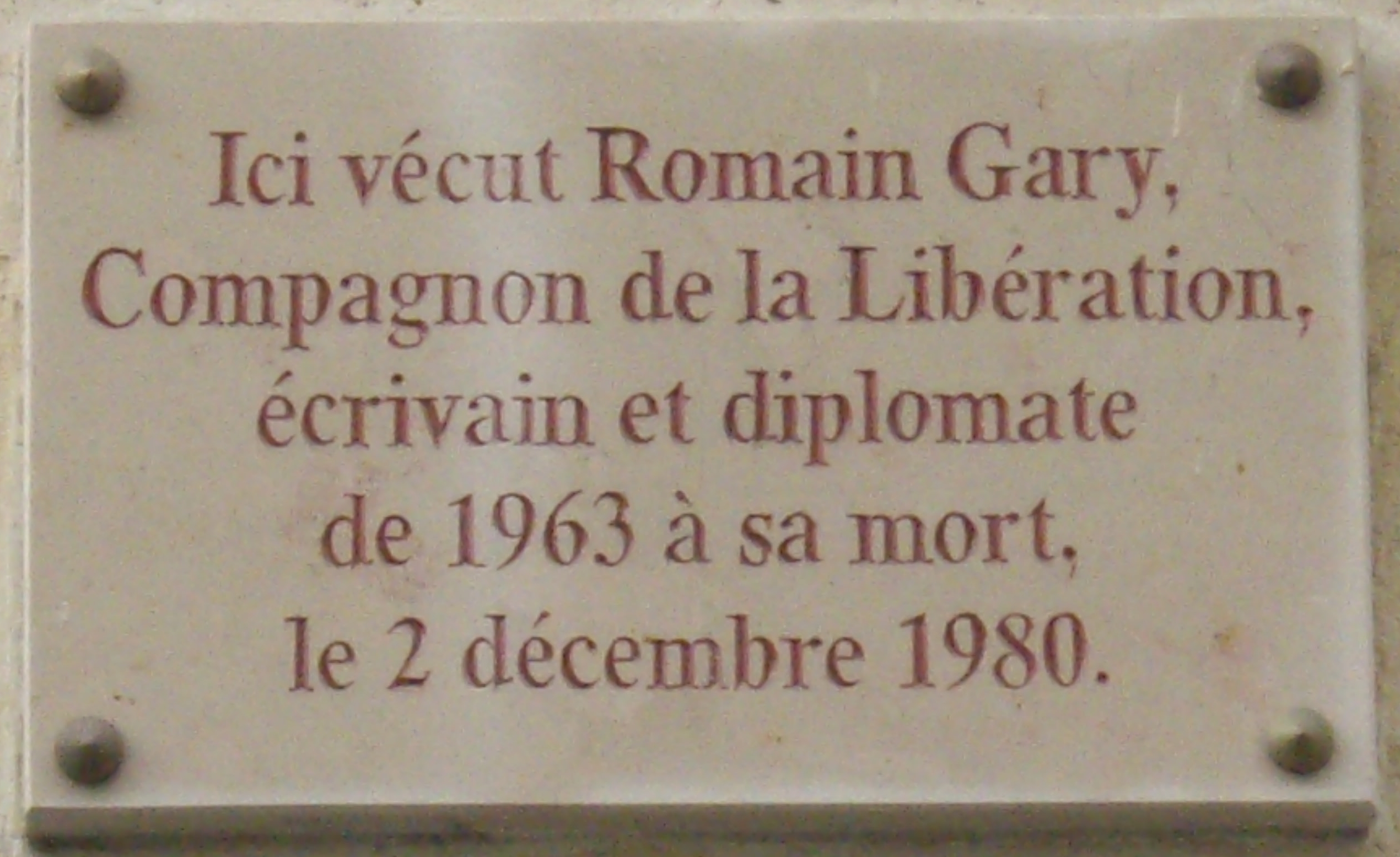 Plaque commémorative, 108 rue du Bac, Paris 7e. « Ici vécut Romain Gary, Compagnon de la Libération, écrivain et diplomate, de 1963 à sa mort, le 2 décembre 1980. »